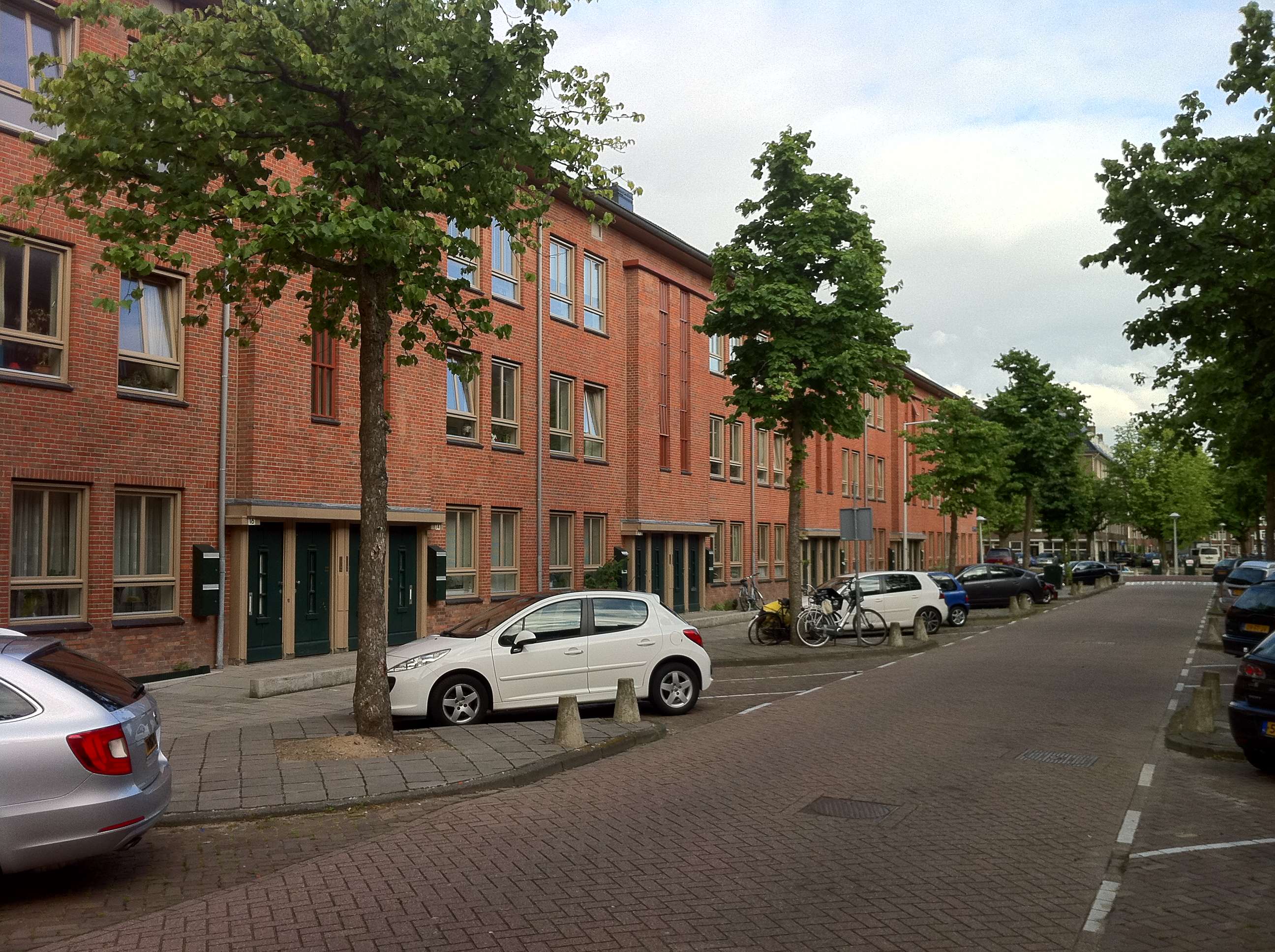 Arbeiderswoningen gebouwd door Zomers Buiten, ontwerp Gulden en A. van der Linde 1933, nu verhuurd door Ymere. Joris van Andringastraat Amsterdam